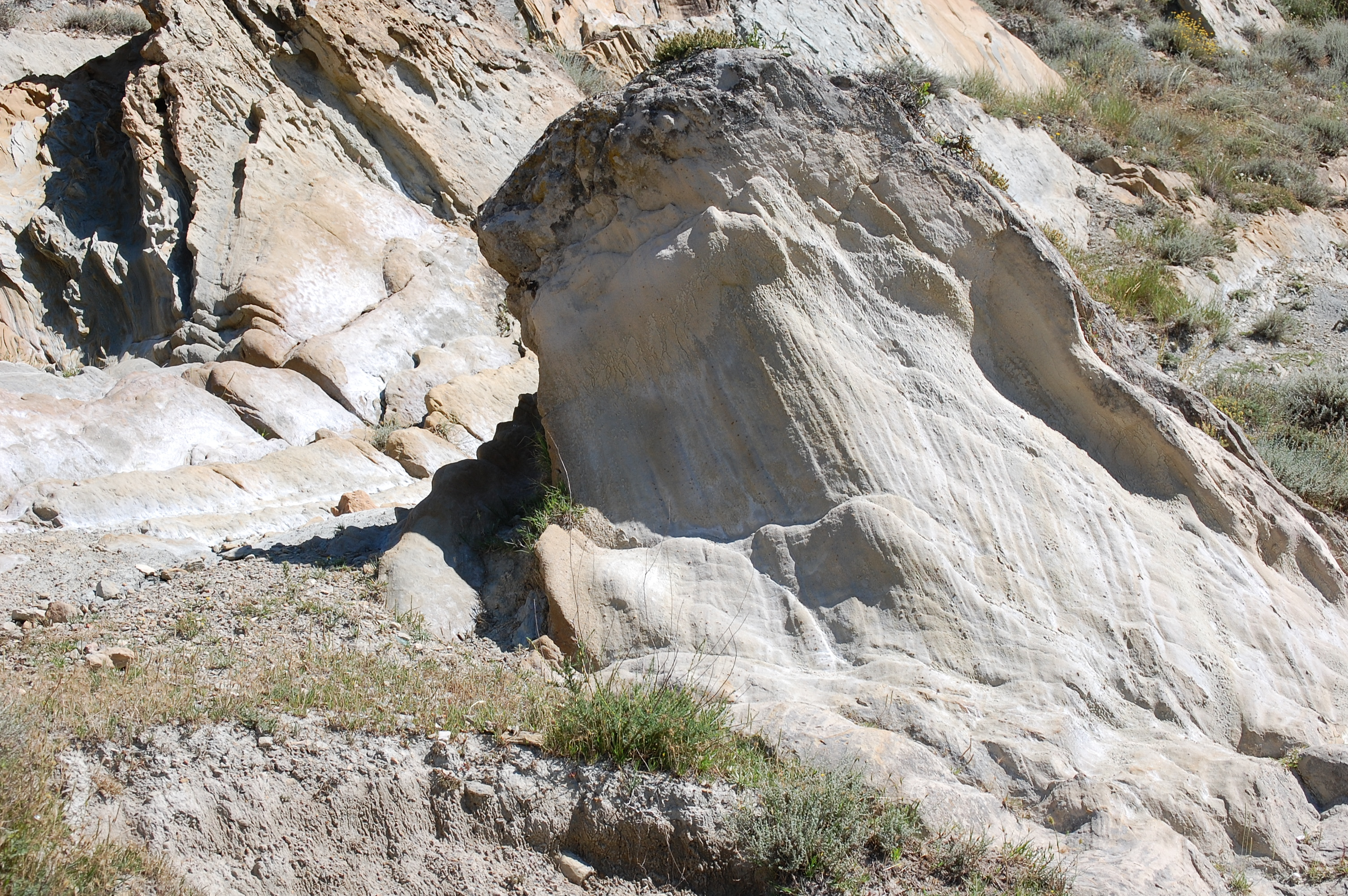 Piedra caliza